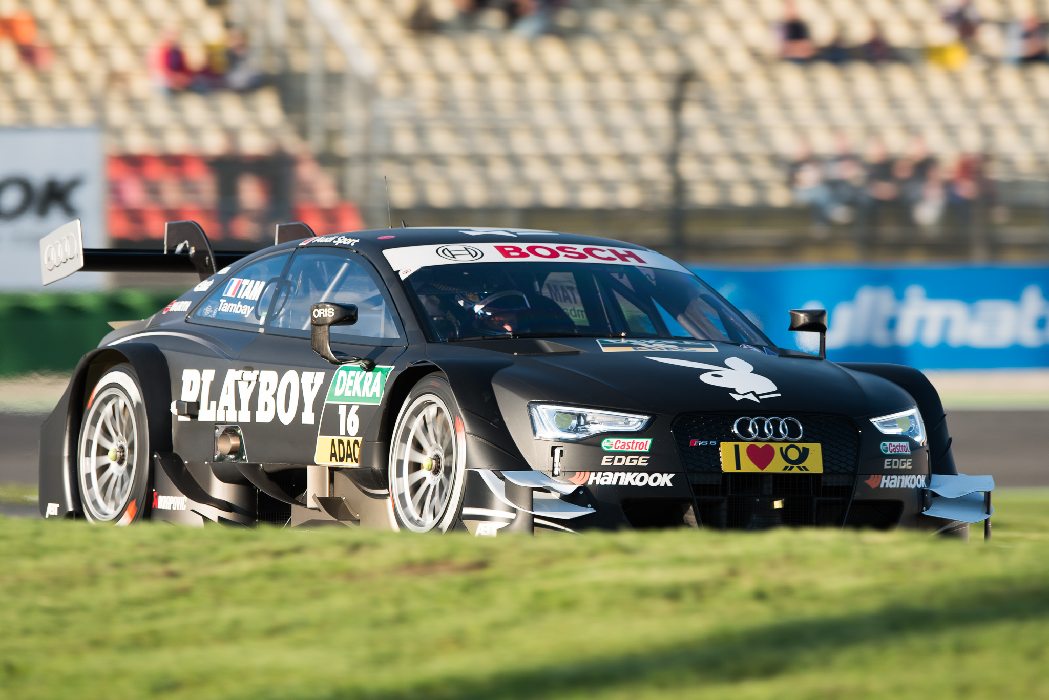 Abt Sportsline GmbH,Adrien Tambay,DTM,Deutsche Tourenwagen Masters,Hockenheimring,Motorsport,Playboy Audi RS 5 DTM